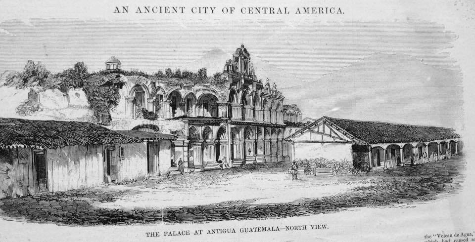 Palacio de los Capitanes Generales de Antigua Guatemala luego del Terremoto de Santa Marta y antes de la reconstrucción de sus arcadas. Las columnas estaban guardas en los cobertizos que aparecen frente al real palacio.